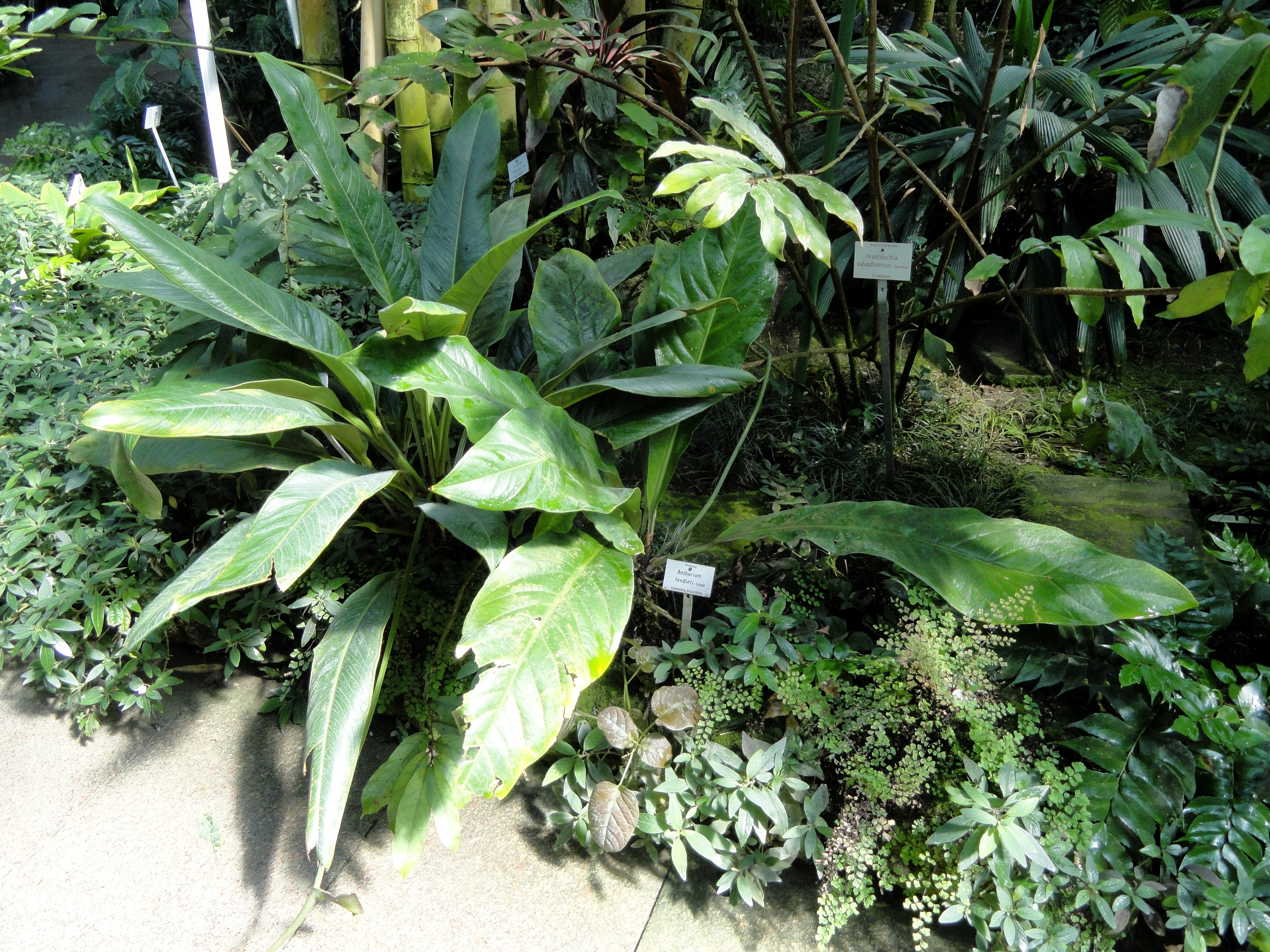 Anthurium fendleri specimen in the Botanischer Garten München-Nymphenburg, Munich, Germany.